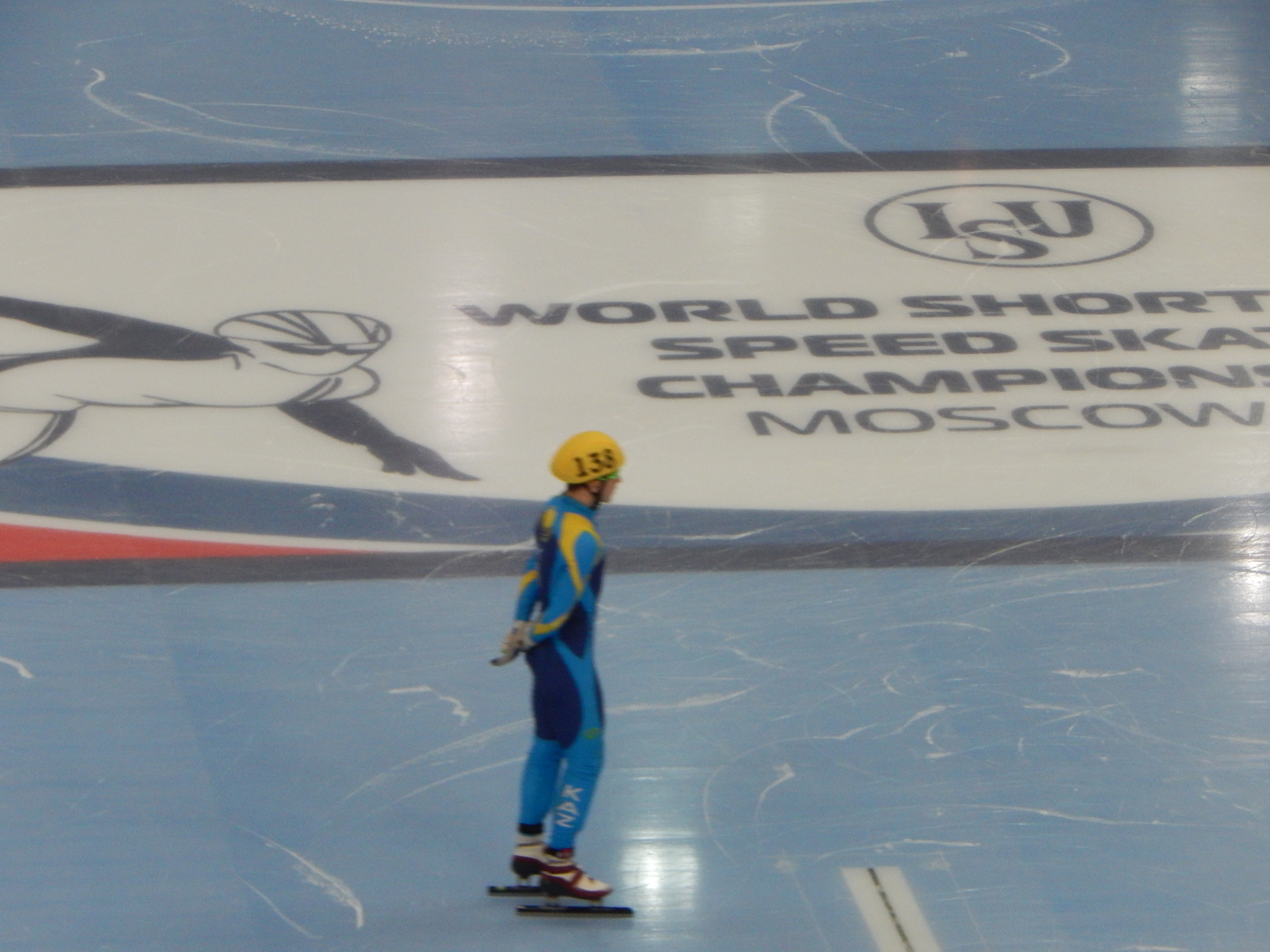 Чемпионат мира по шорт-треку 2015 в Москве Квалификационный раунд, 8 забег, 1000 м, мужчины